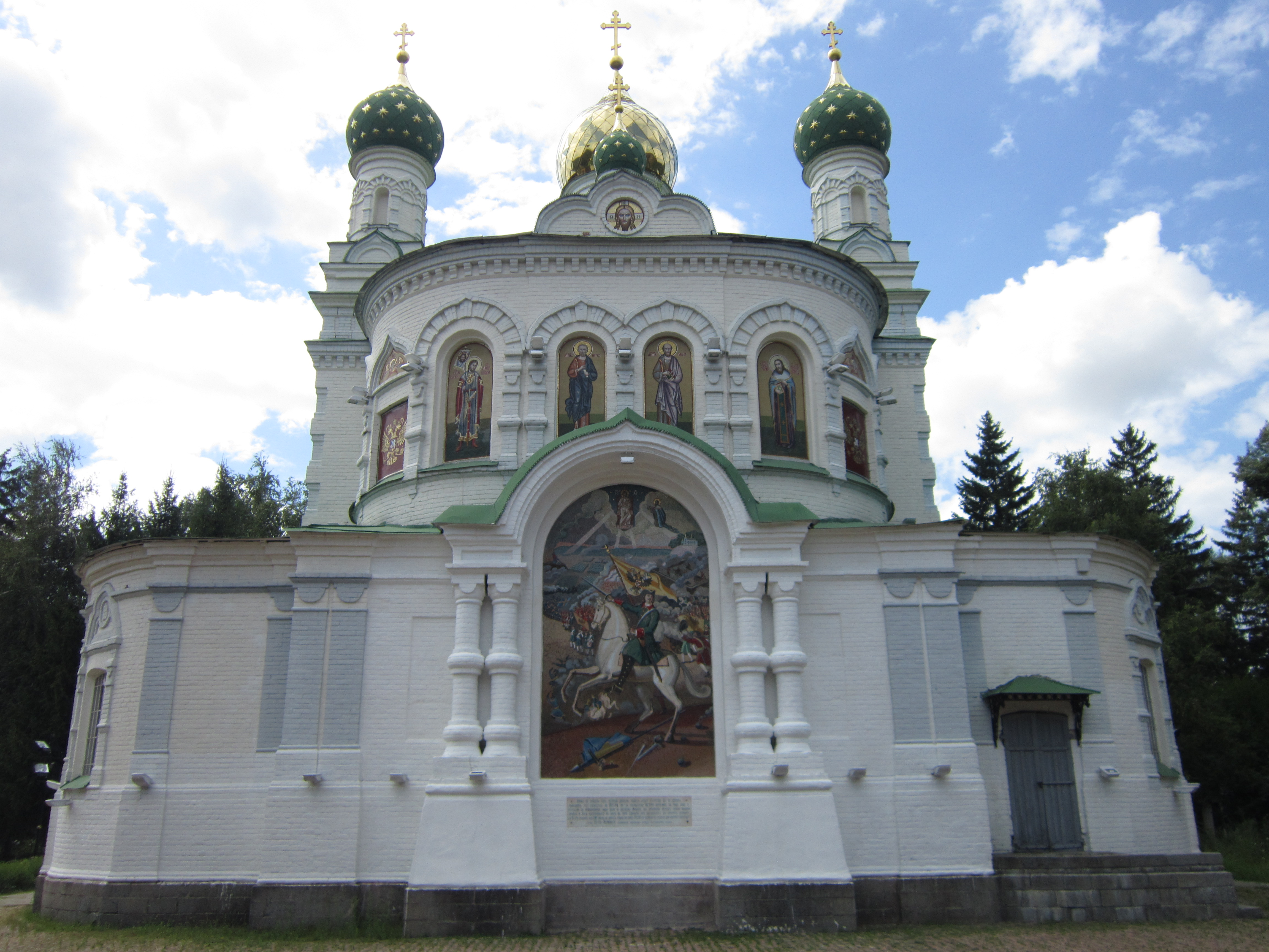 Комплекс пам'яток на історичному місці полі Полтавської битви «Поле Полтавської битви», Полтава, північно-західна околиця